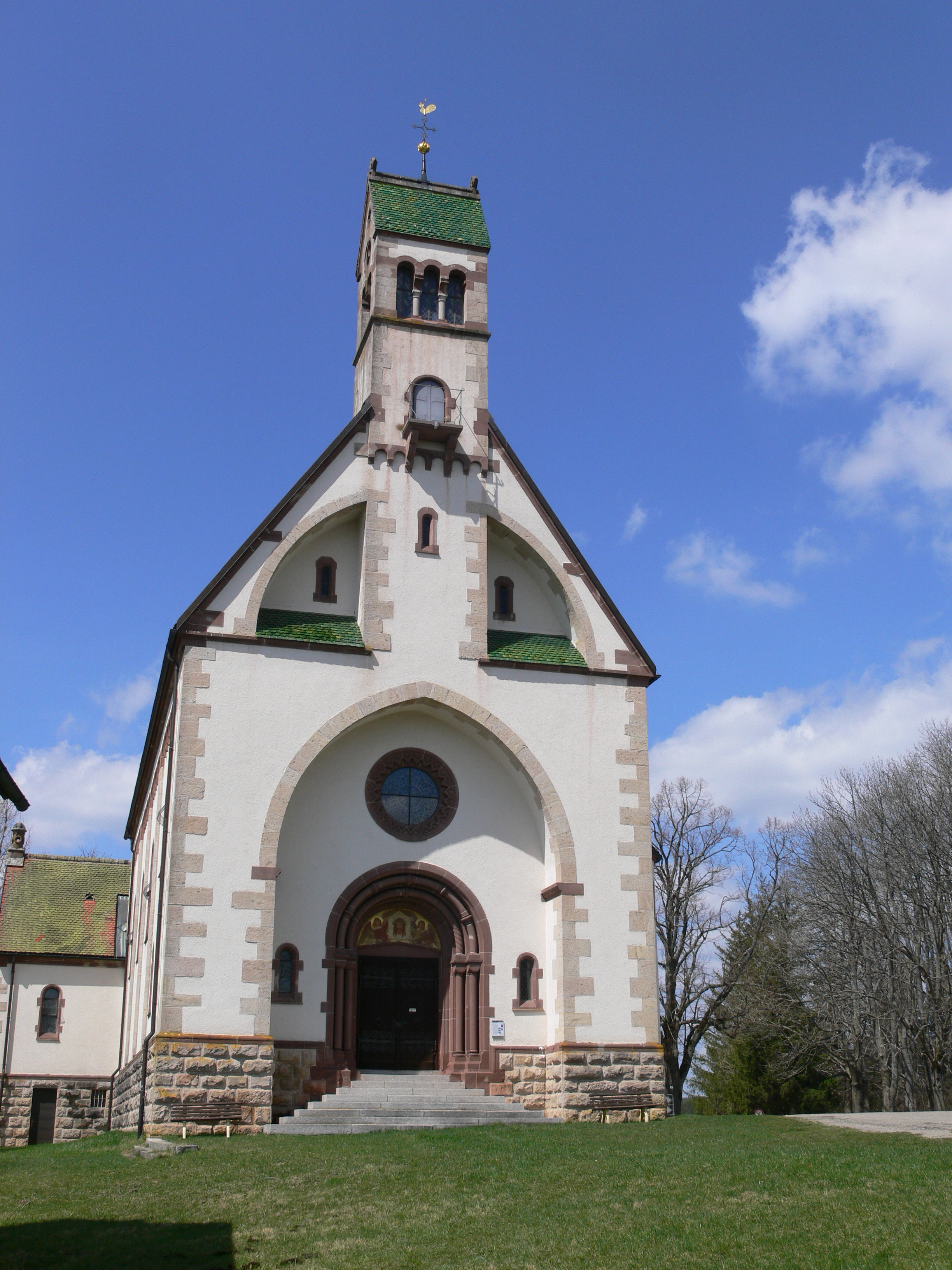 Wallfahrtskirche Maria Witterschnee (Schneekreuz), Löffingen